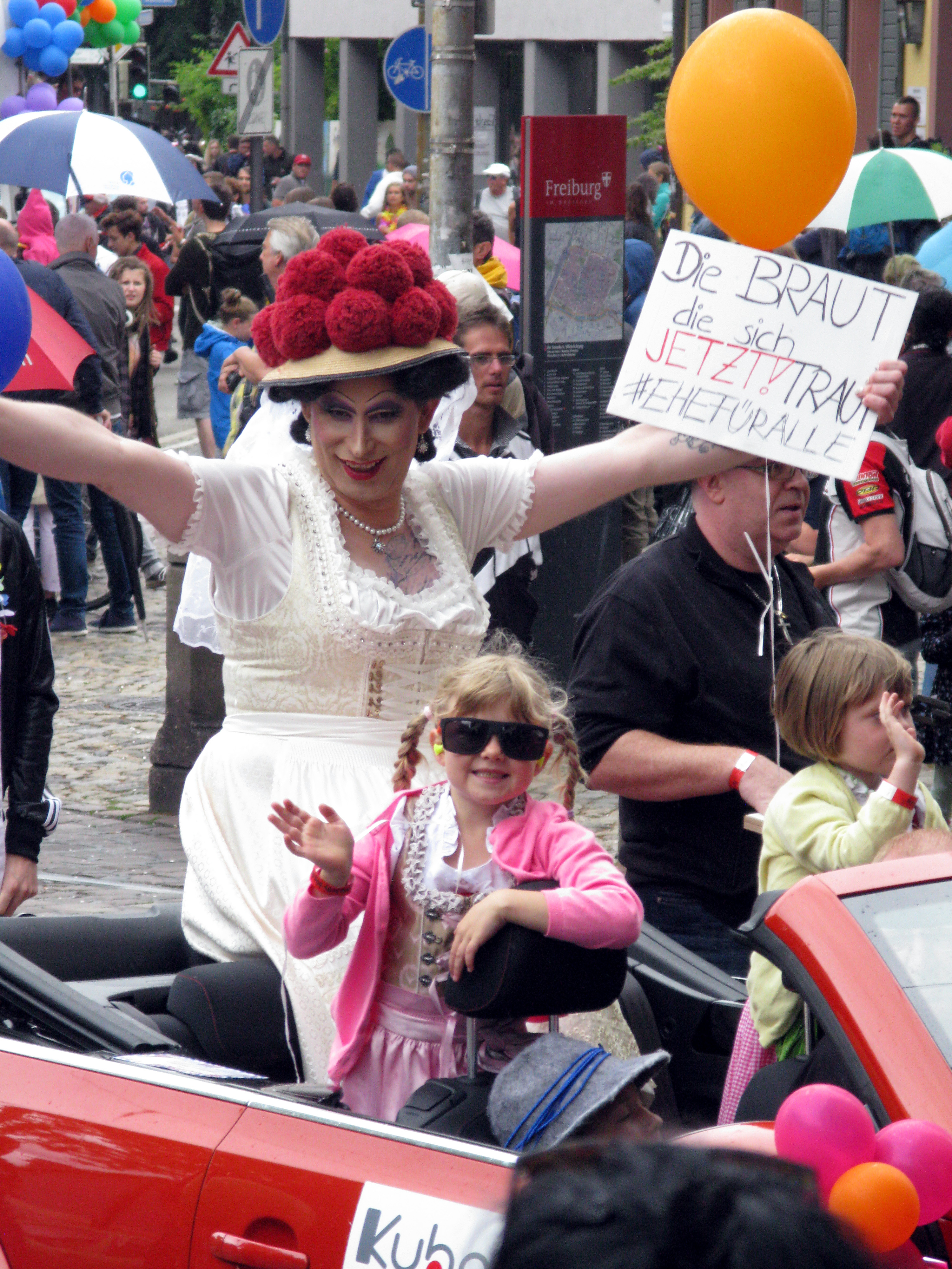 CSD in Freiburg 2017, Betty BBQ, Freiburgs bekannte Dragqueen als Braut die sich jetzt traut